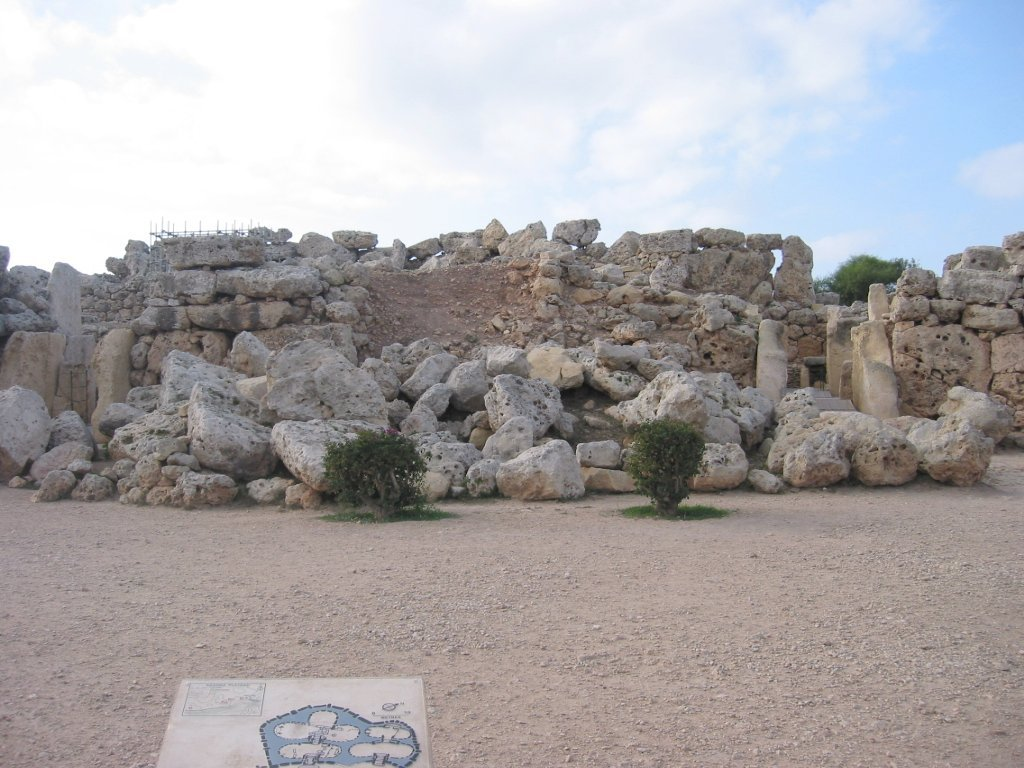 Ggantija temple